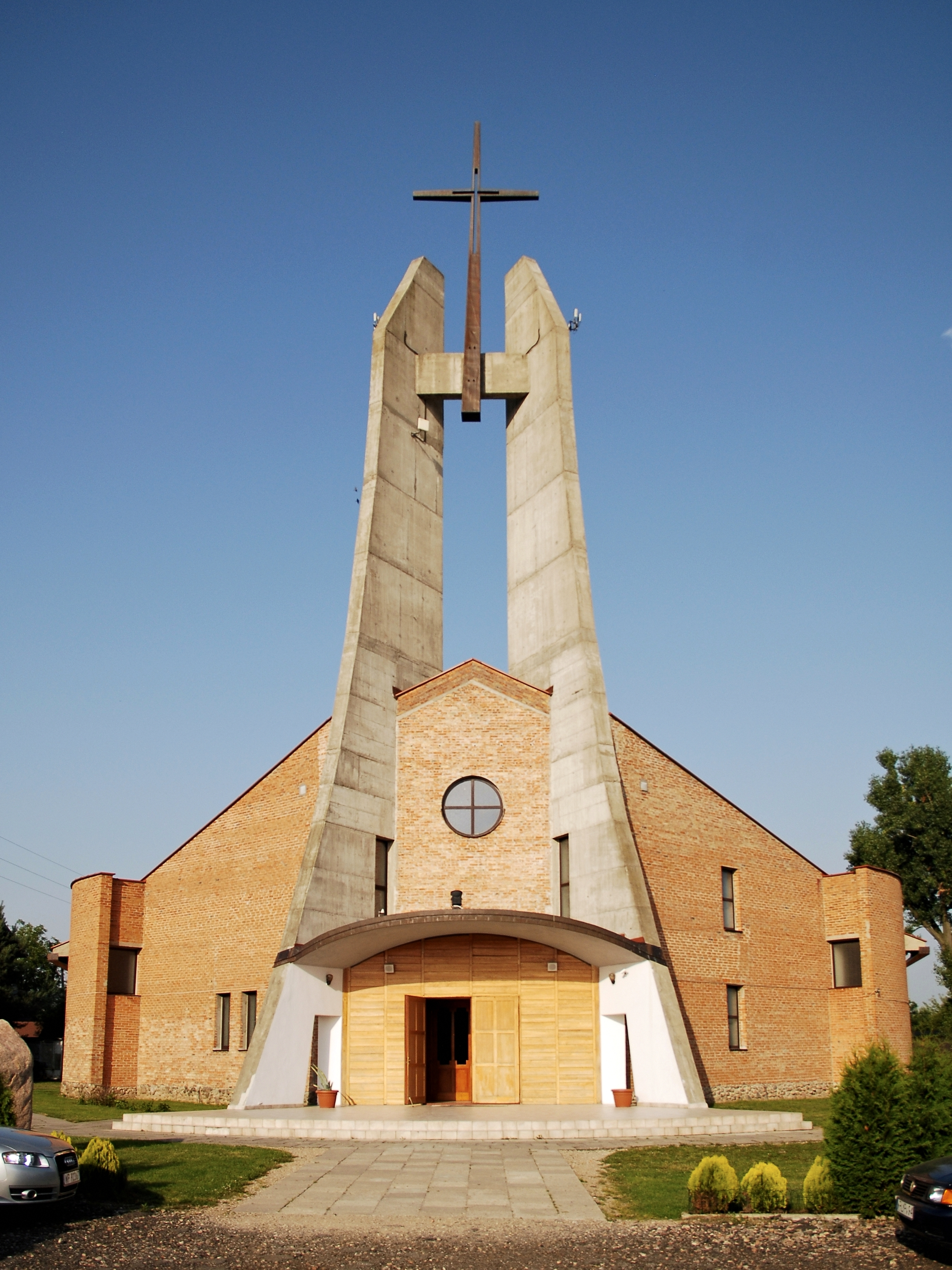 Kościół pw. św. Faustyny Apostołki Bożego Miłosierdzia w Rogozinie (powiat płocki).